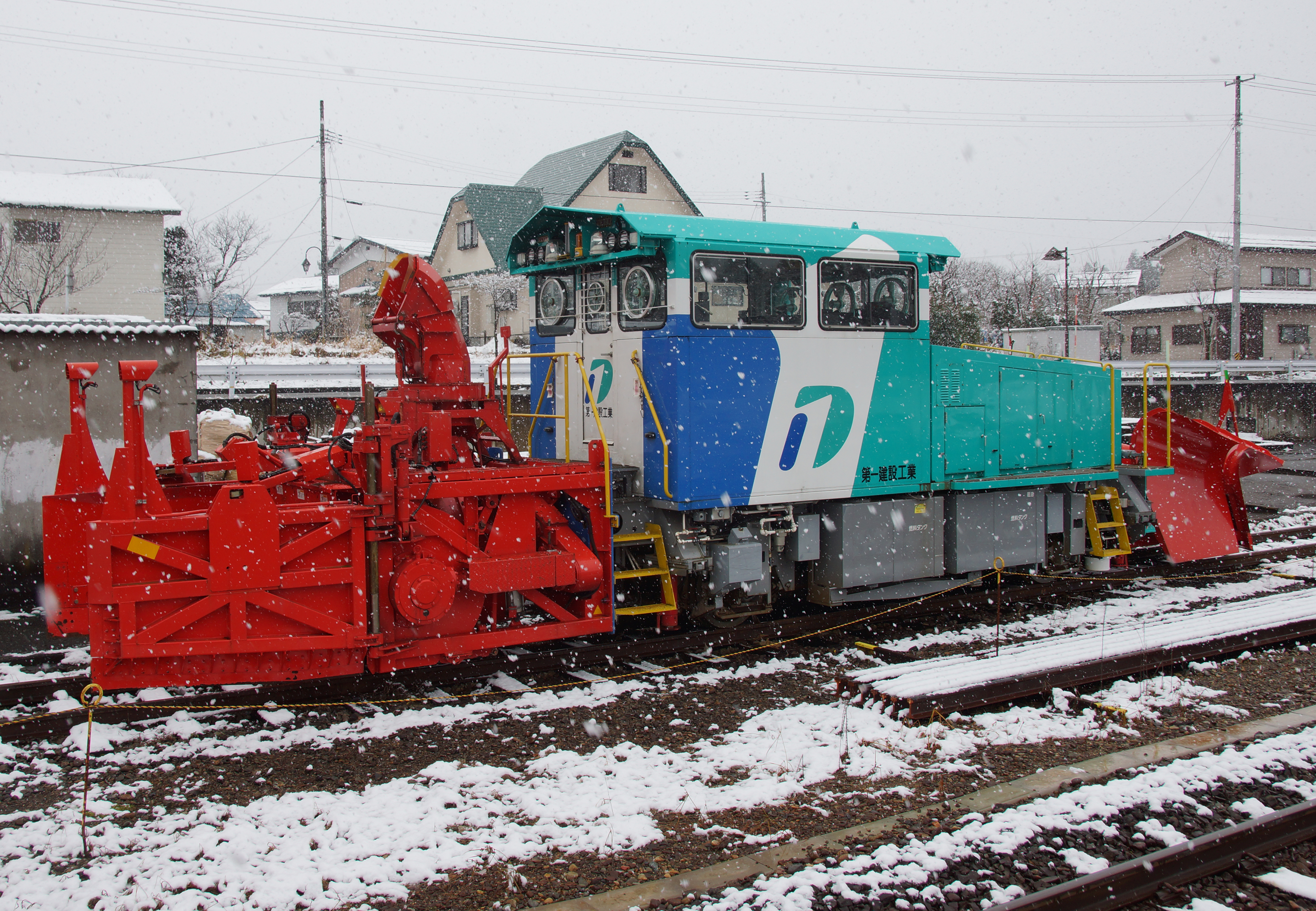 磐越西線で使用中のMCR除雪用モーターカー